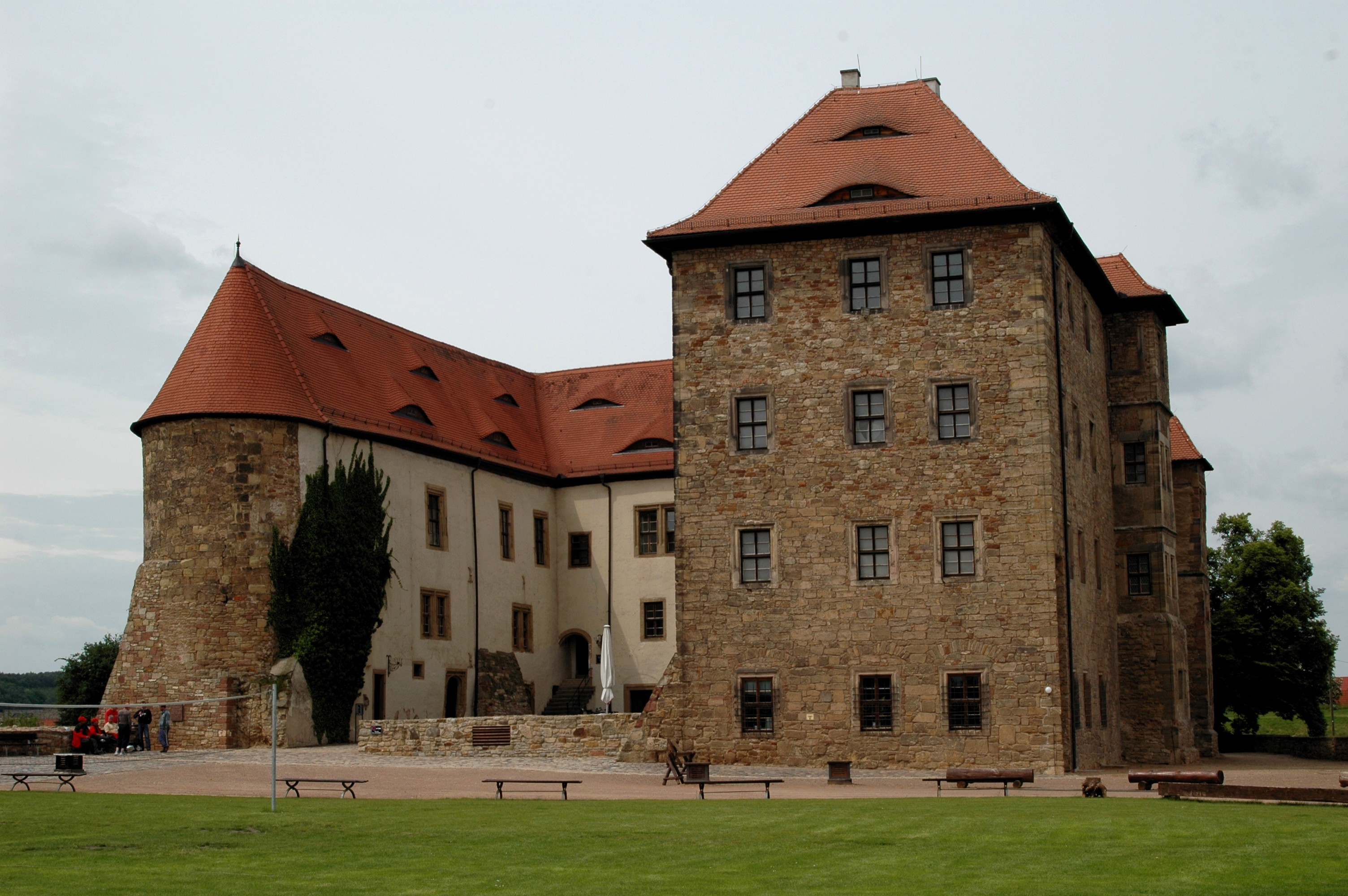 Wasserschloss Heldrungen, Thüringen